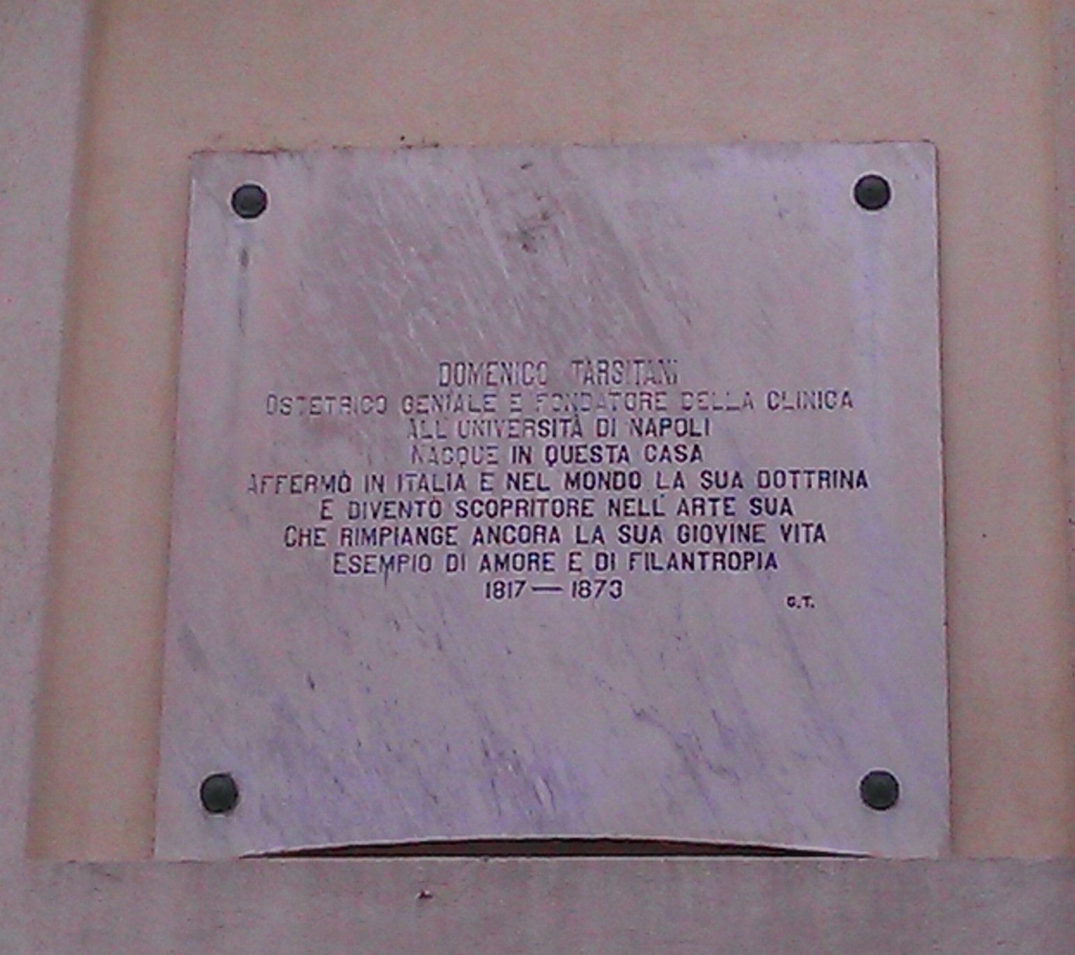 foto scattata da me difronte alla casa natale di Domenico Tarsitani